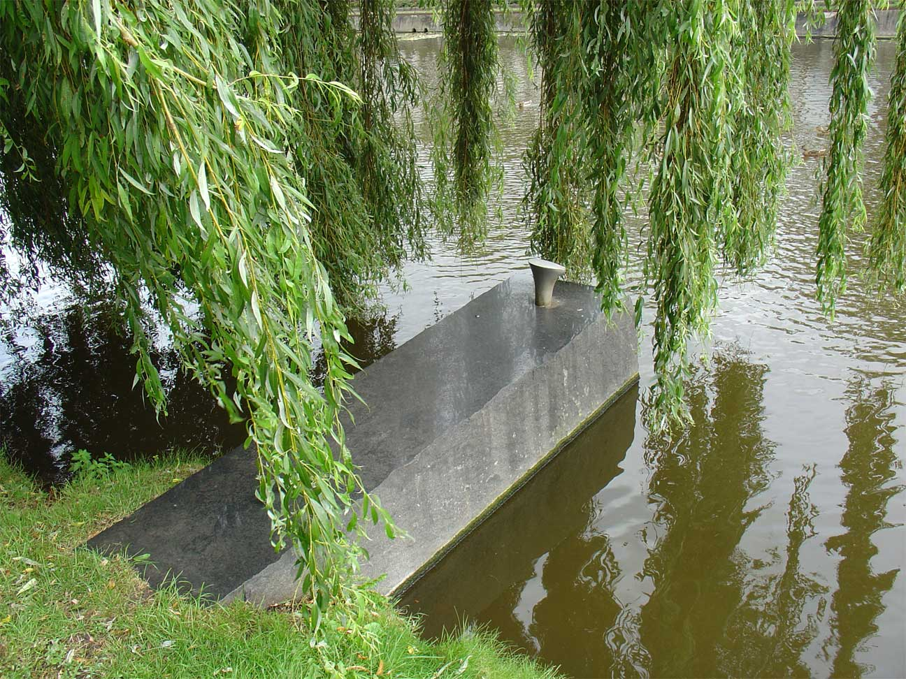 Zonder titel door Roberto Ruggiu - Houtmansplantsoen Gouda